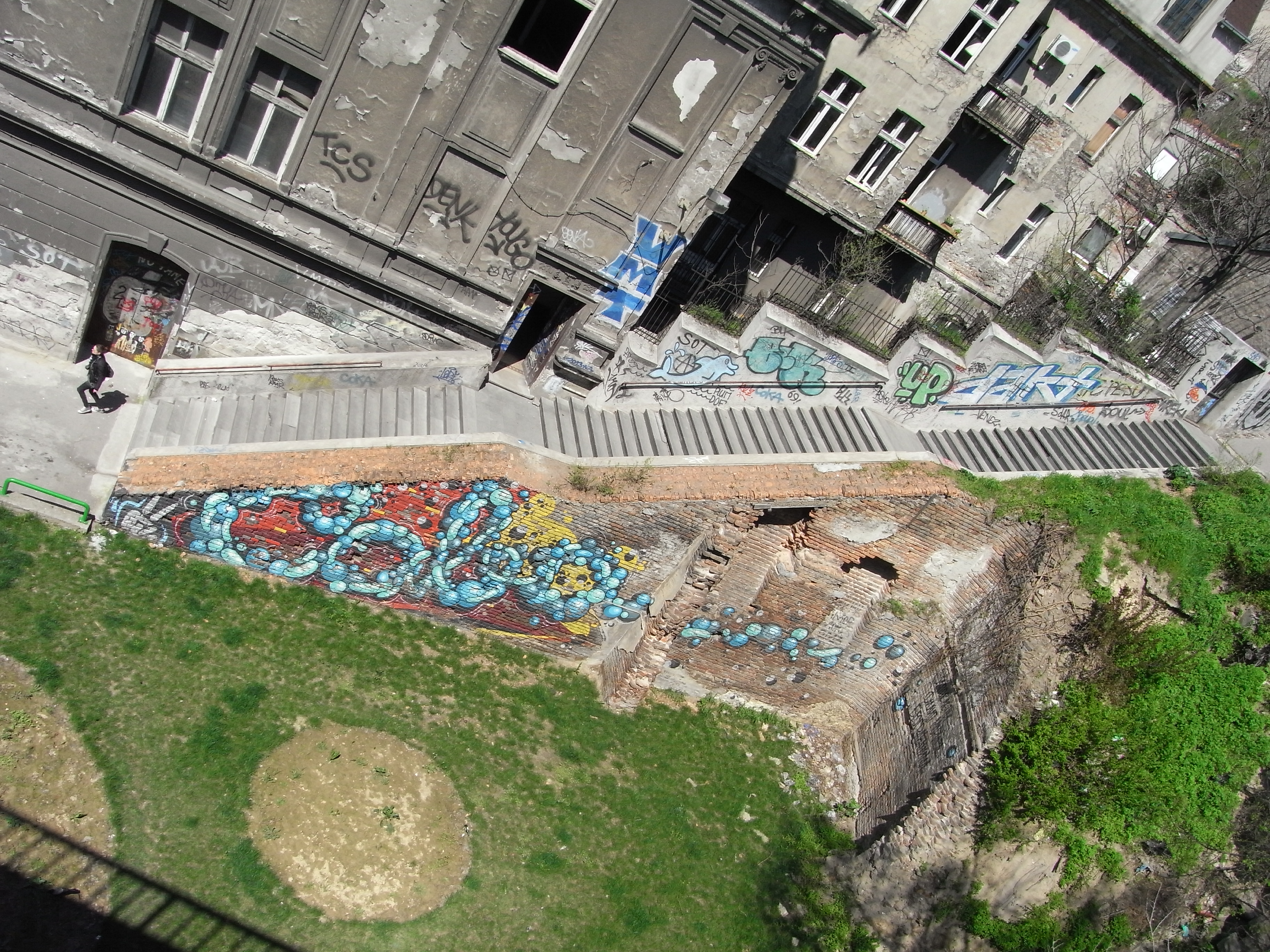 Un escalier à Belgrade